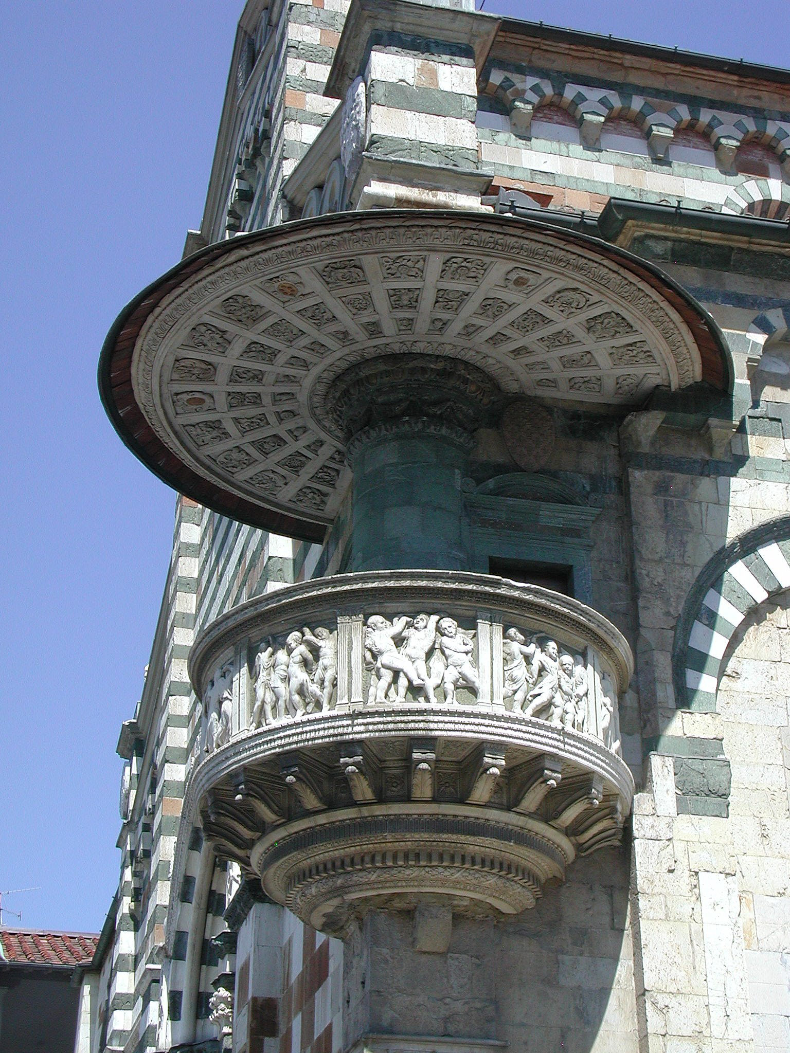 Pulpito di Donatello e Michelozzo - Duomo di Prato.